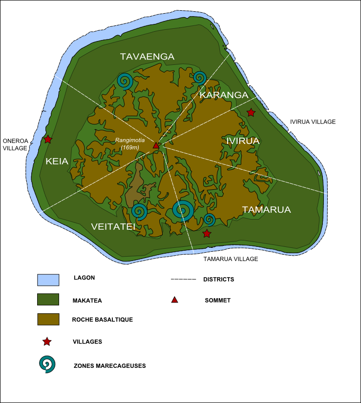 Carte de Mangaia/Map of Mangaia